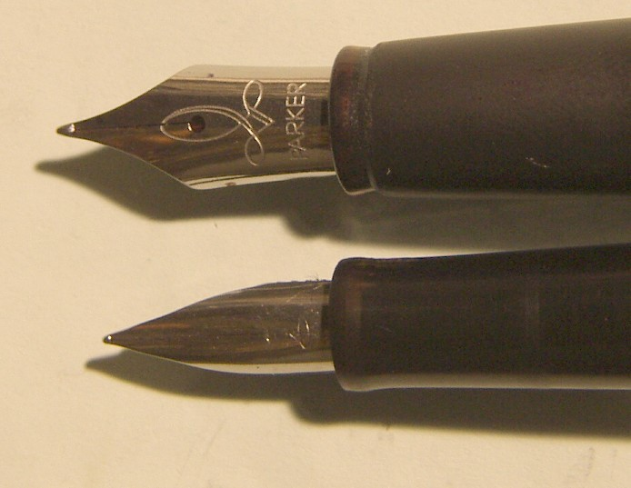 Parker Vulpennen